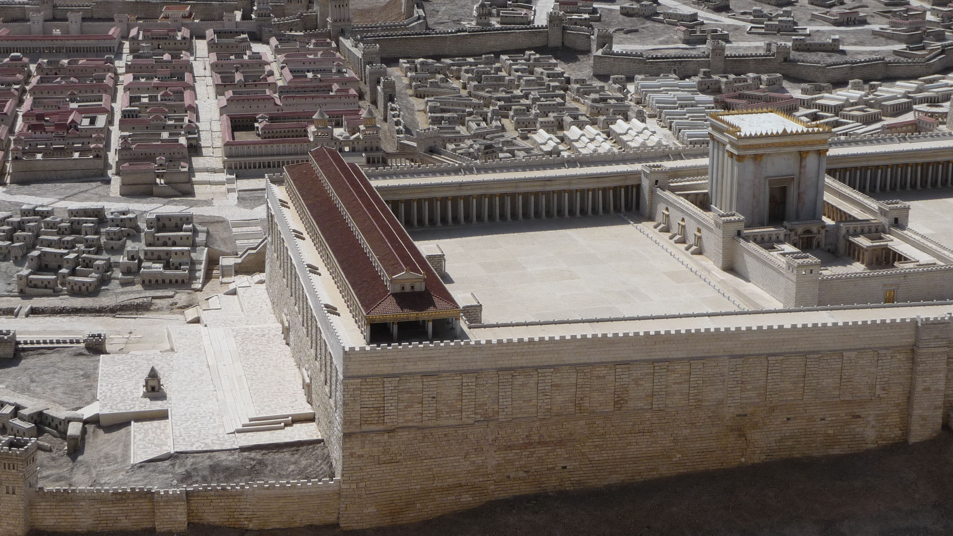 jerusalem_1_003 Jerusalem